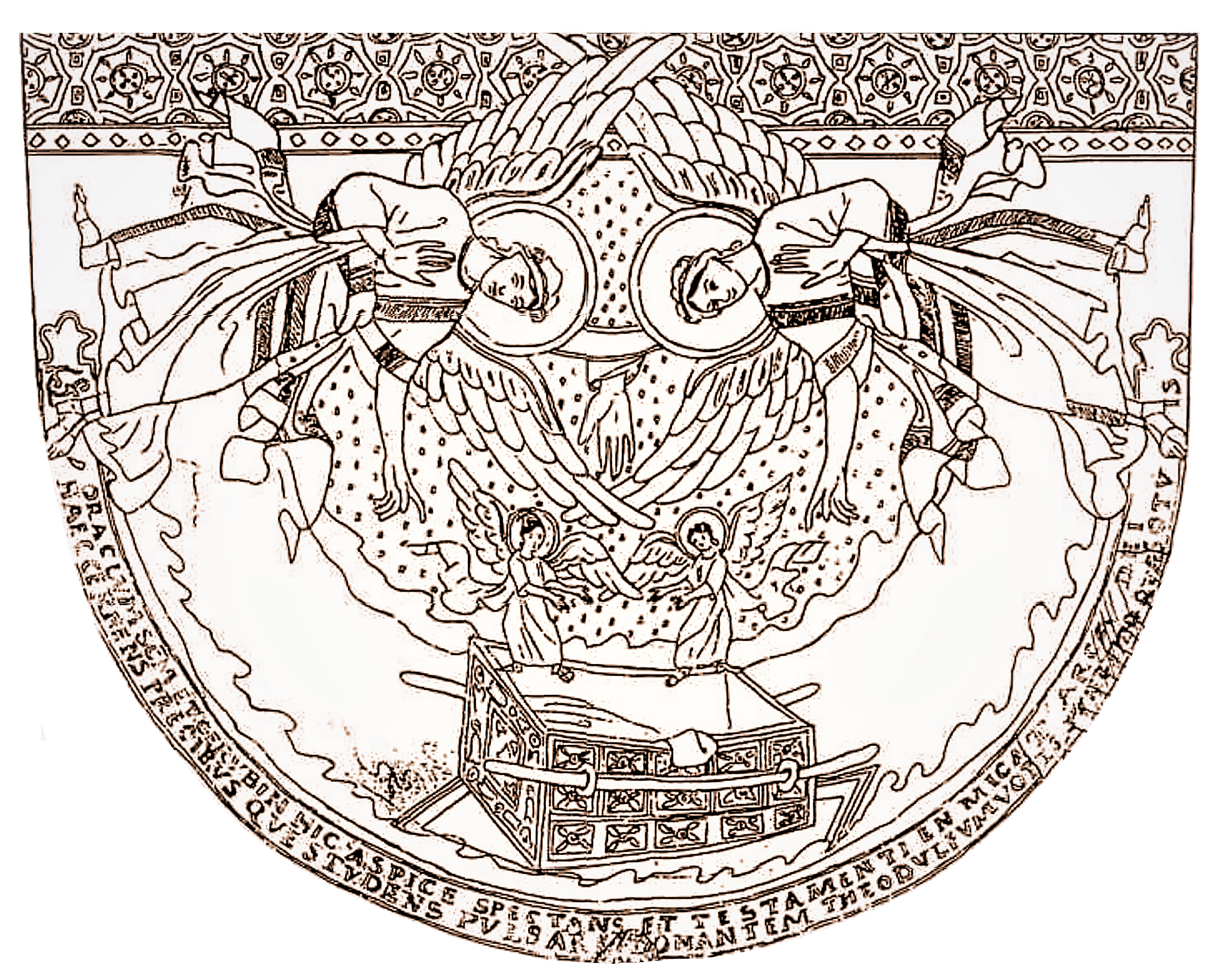 Oratoire carolingien de Germigny-des-Prés, croquis de la mosaïque (image du domaine public modifié)